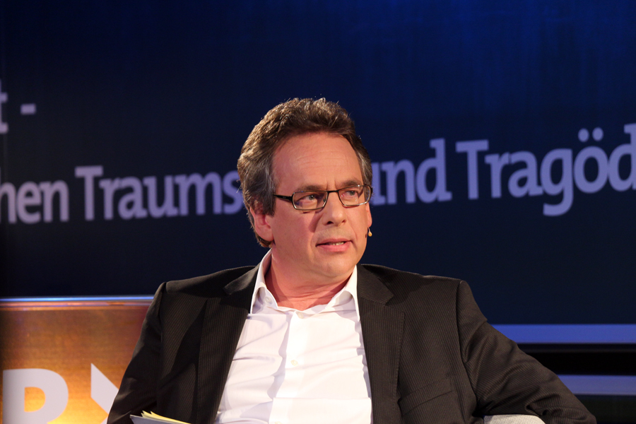 Fritz Frey spricht mit dem Entertainer Harald Schmidt beim SWR UniTalk an der Johannes Gutenberg-Universität Mainz über "Wie es Euch gefällt - Medienwelten zwischen Traumschiff und Tragödie"